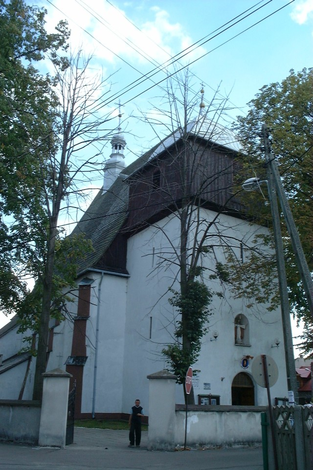 Poland, Kozieglowy - church.